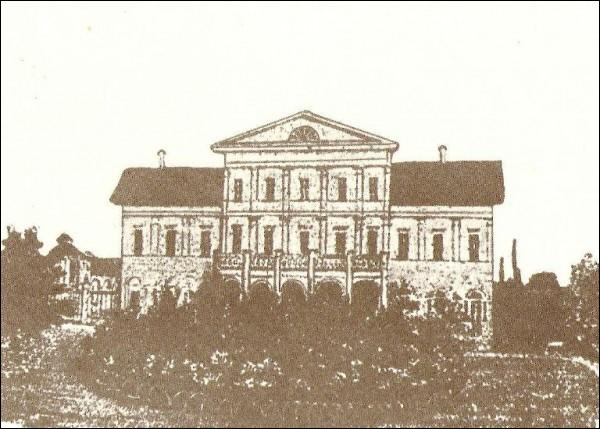 Палац у Дабраўлянах на літаграфіі К. Бахматовіча